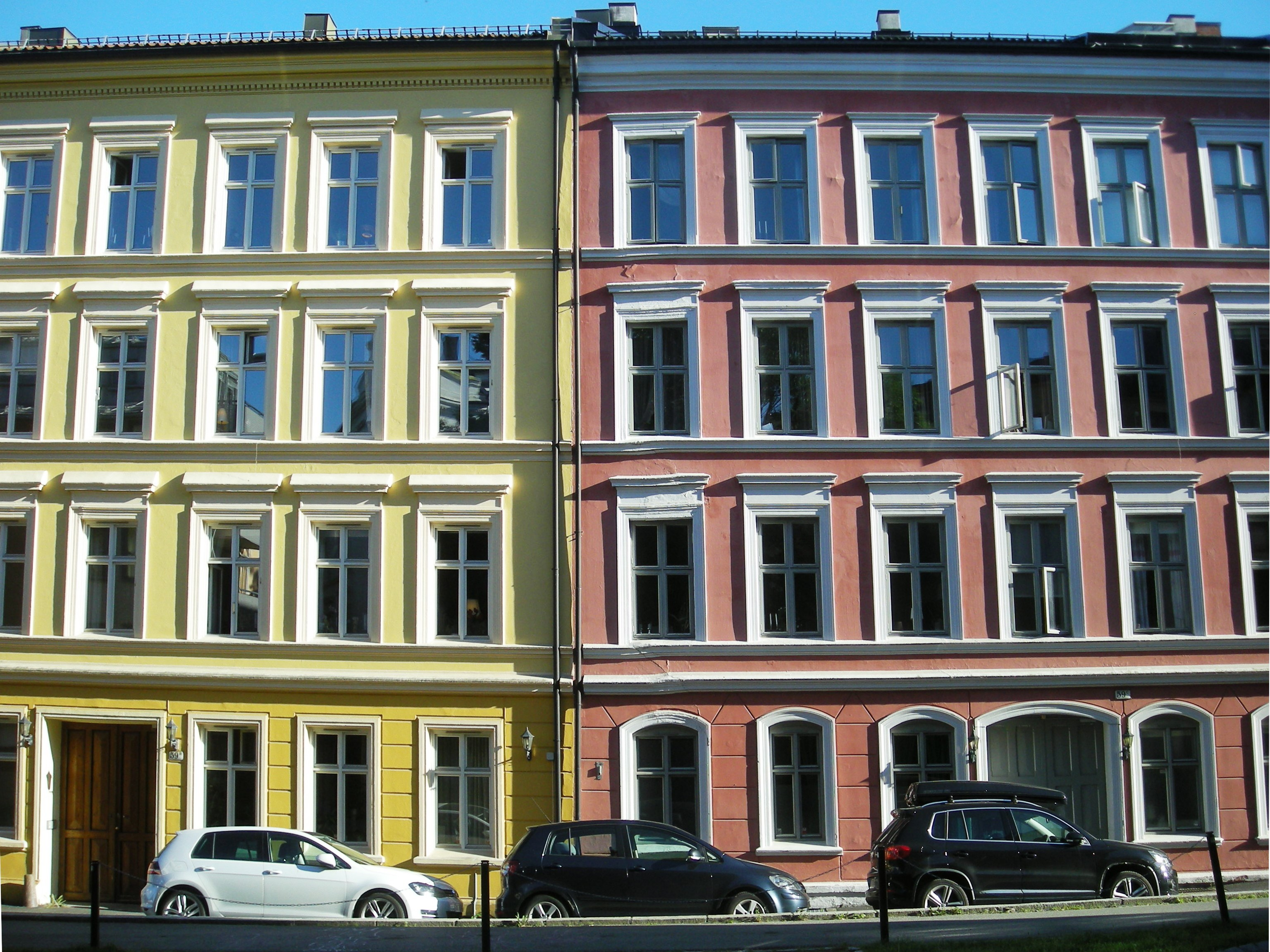 Bebyggelse på sørsiden av Løkkegangen på Ruseløkka, med adresse Hutfeldts gate og Ruseløkkveien